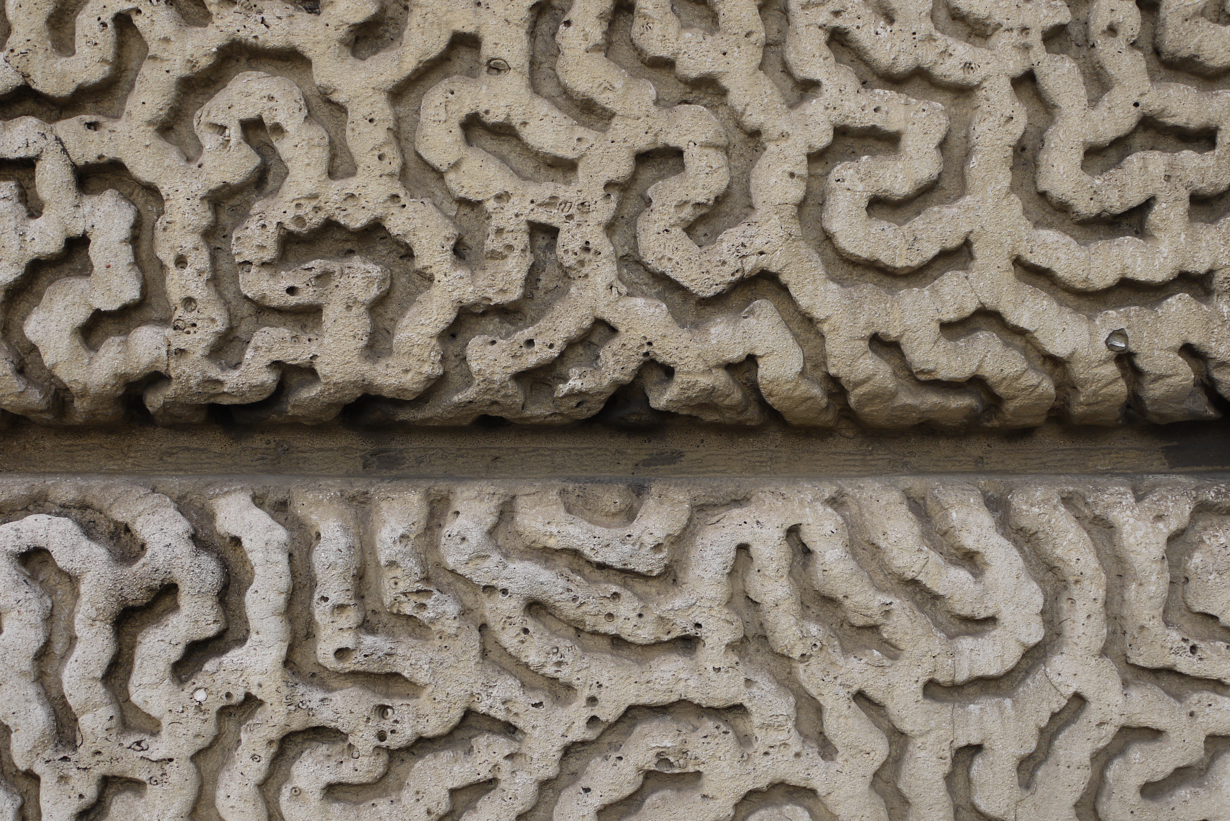 Vermiculures sur la Porte Saint-Martin, Paris.